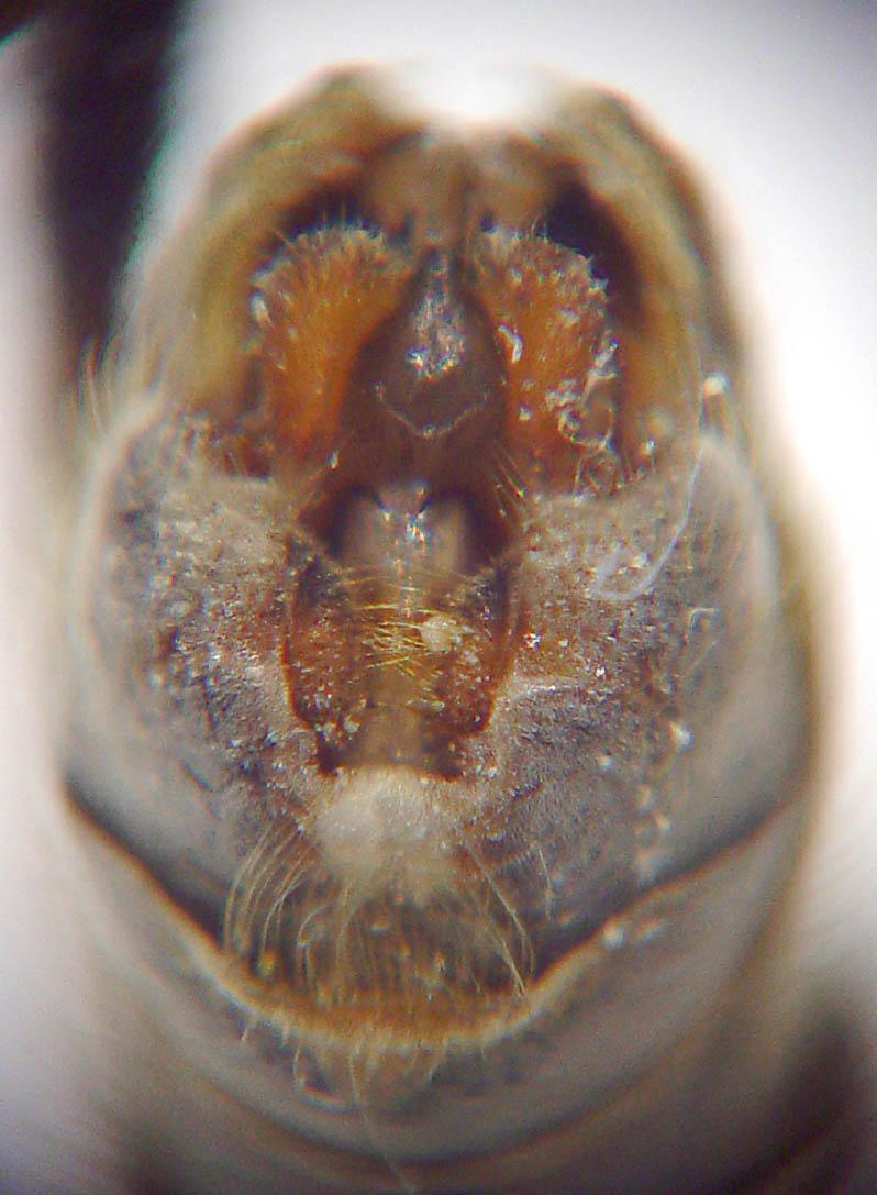 Beschreibung: hinteres Ende einer Schnake Aufnahmedatum: 9. September 2002 Fotograf: ArtMechanic